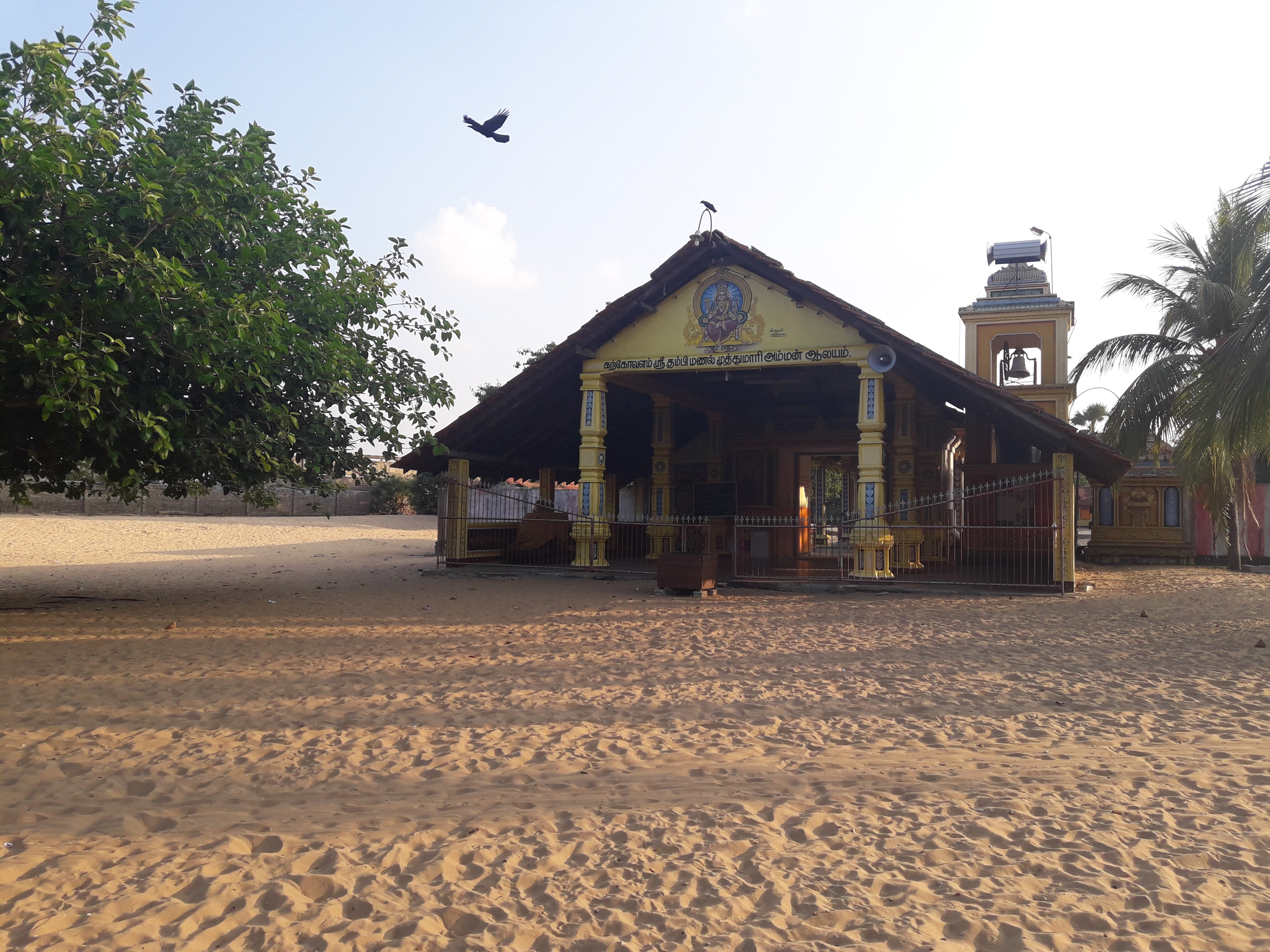 ஶ்ரீ கும்பி மணல் முத்துமாரியம்மன் ஆலயம்